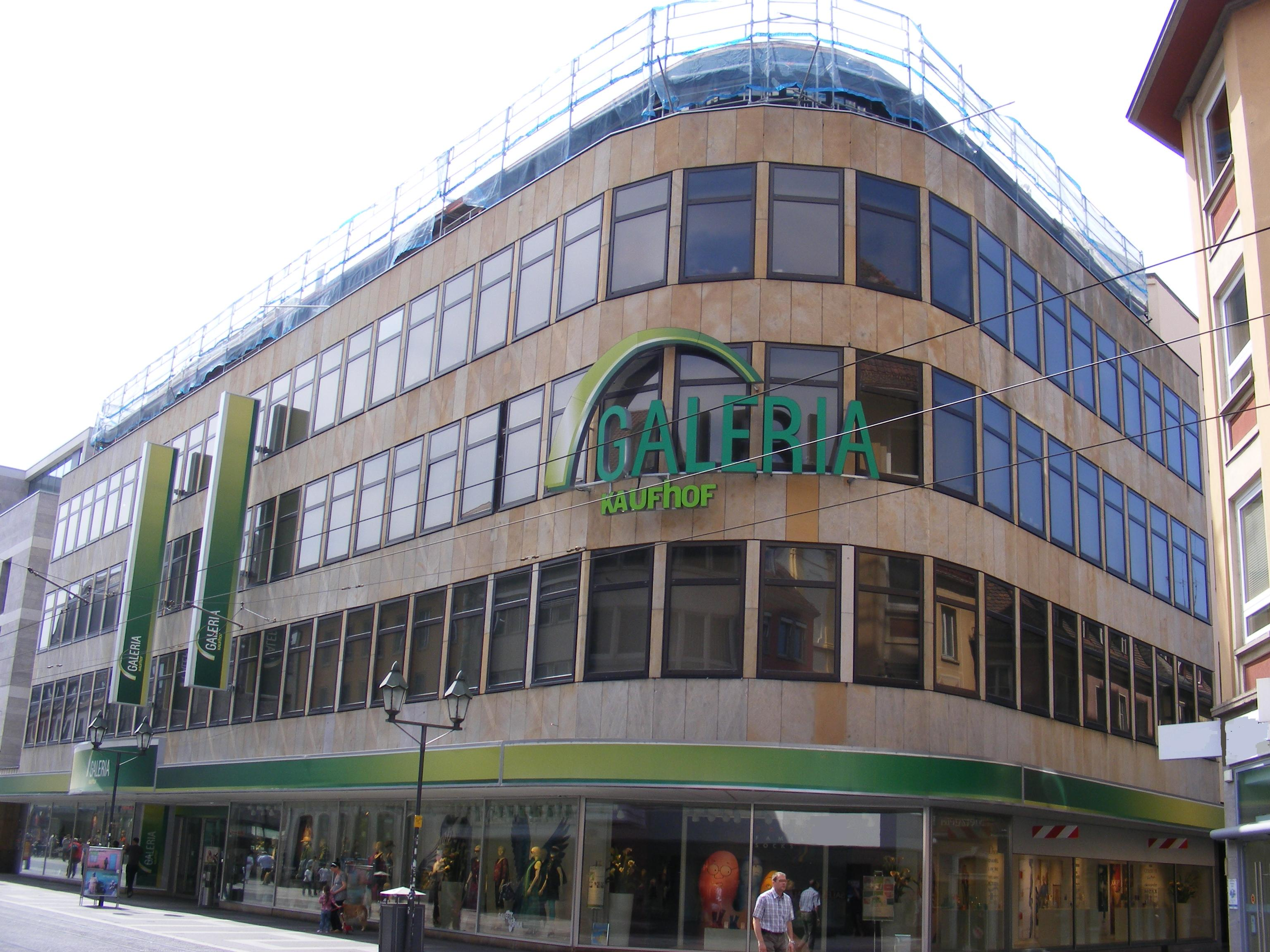 Würzburg - Kaufhof (Schönbornstr. 3).